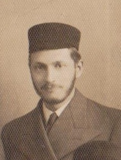 David Wajsbrod